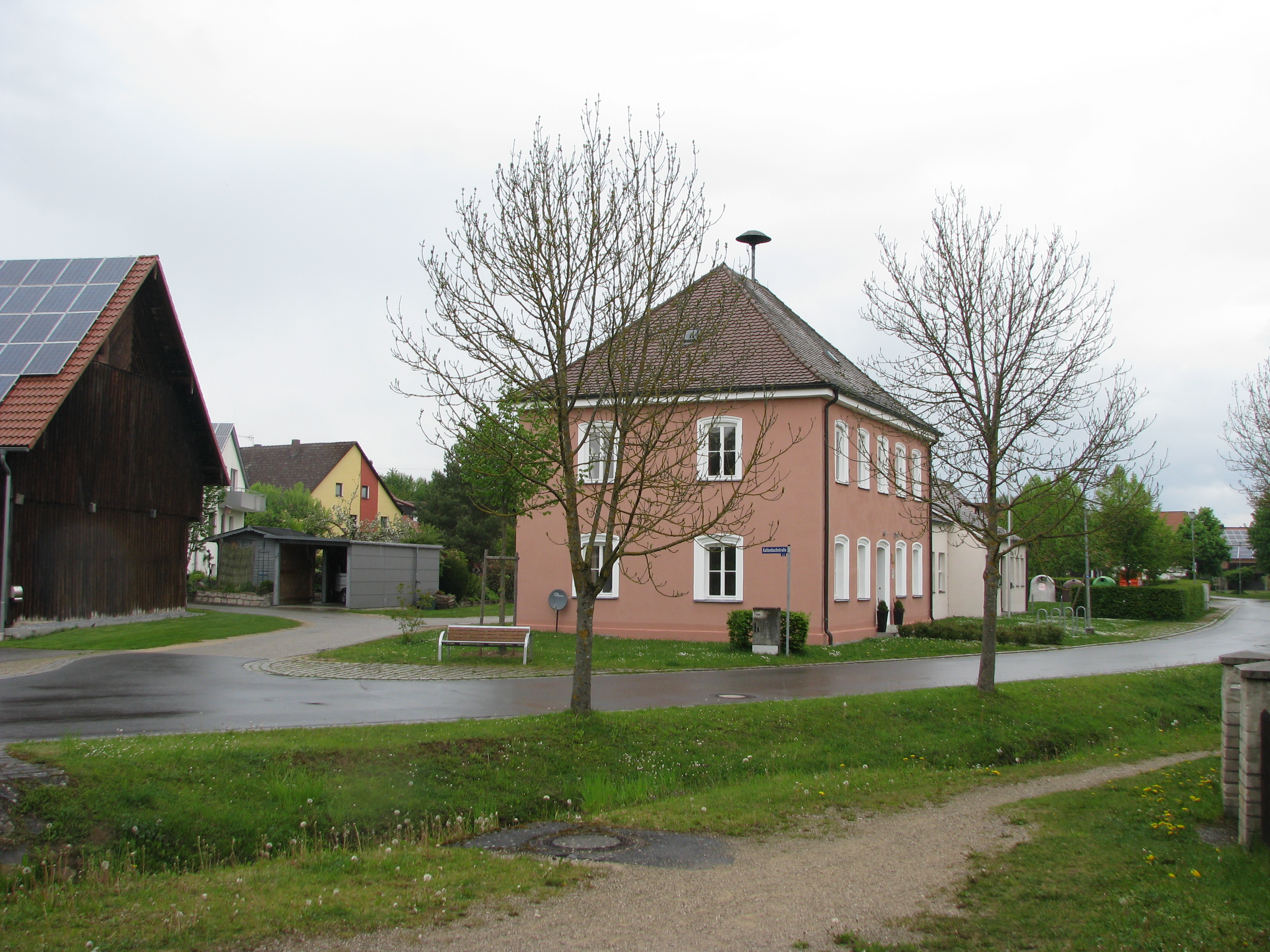 Hausheim, Ortsteil von Berg bei Neumarkt i. d. Opf., Haus des Dorfes